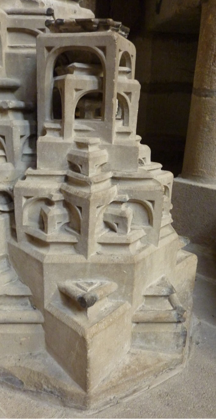 Detail vom Fuß des Sakramentshauses in St. Dionys, ES